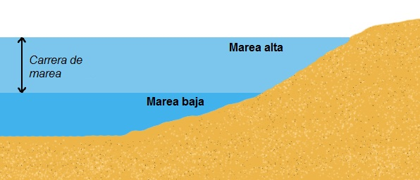 Esquema de carrera de marea